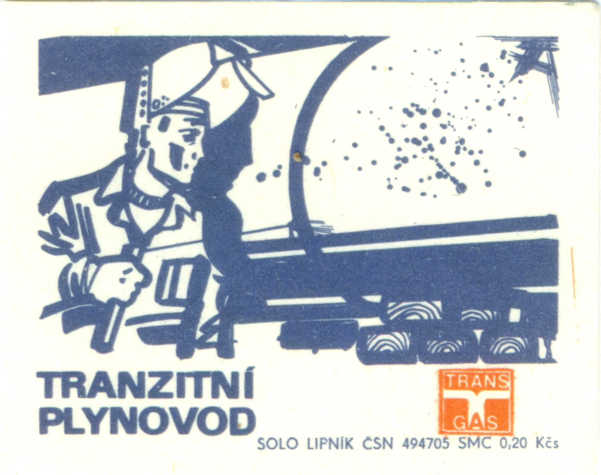 nálepka